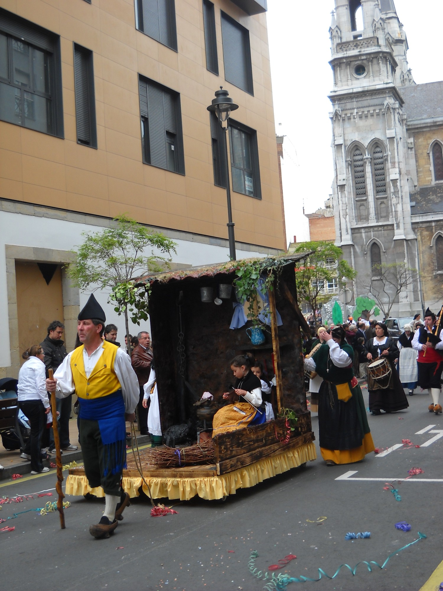 Fiesta del Bollo de Avilés, Asturias